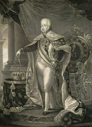 João VI de Portugal, rei de Portugal e imperador titular do Brasil.